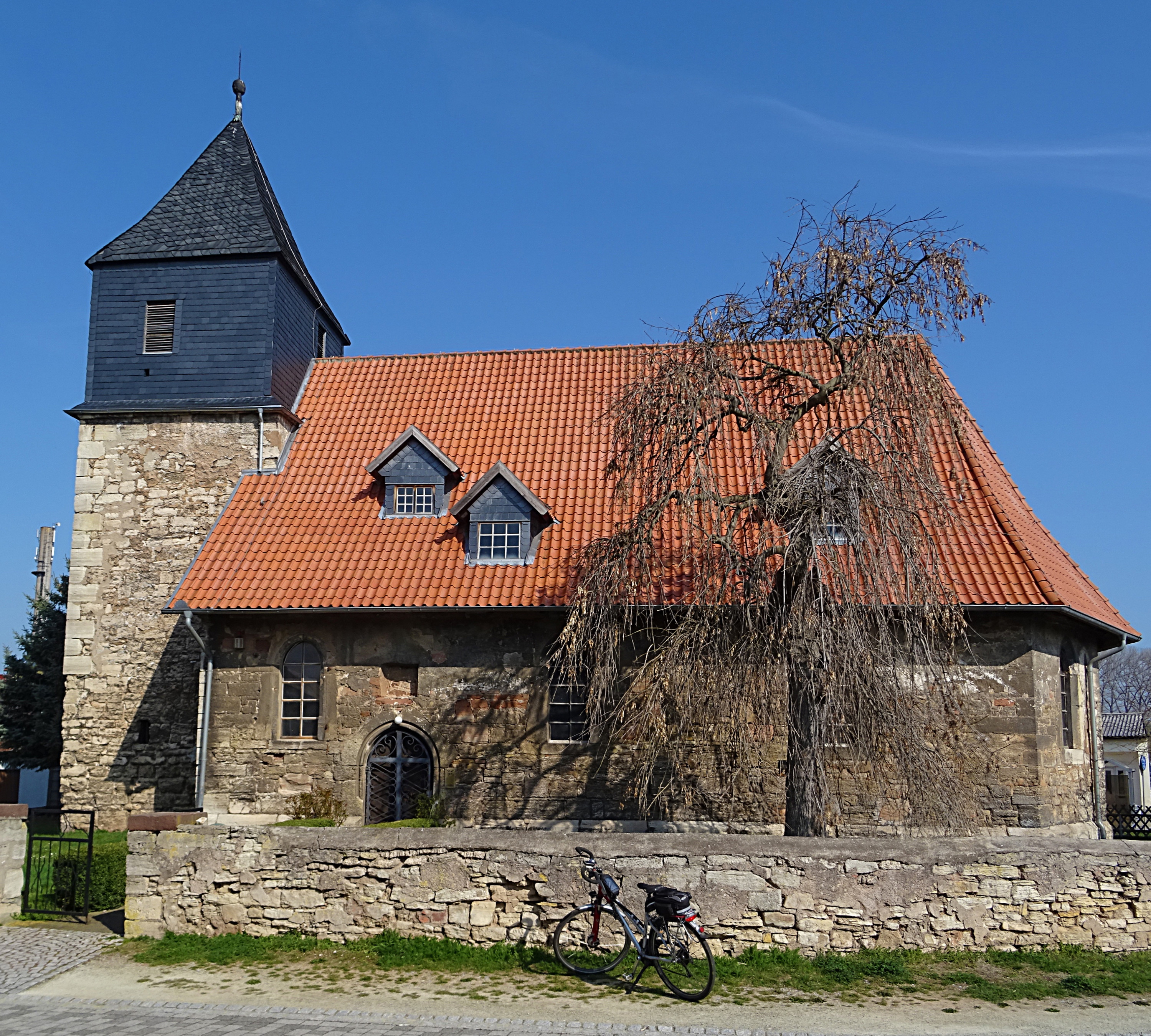 Dorfkirche St. Albani in Pustleben, erbaut im 10. Jahrhundert